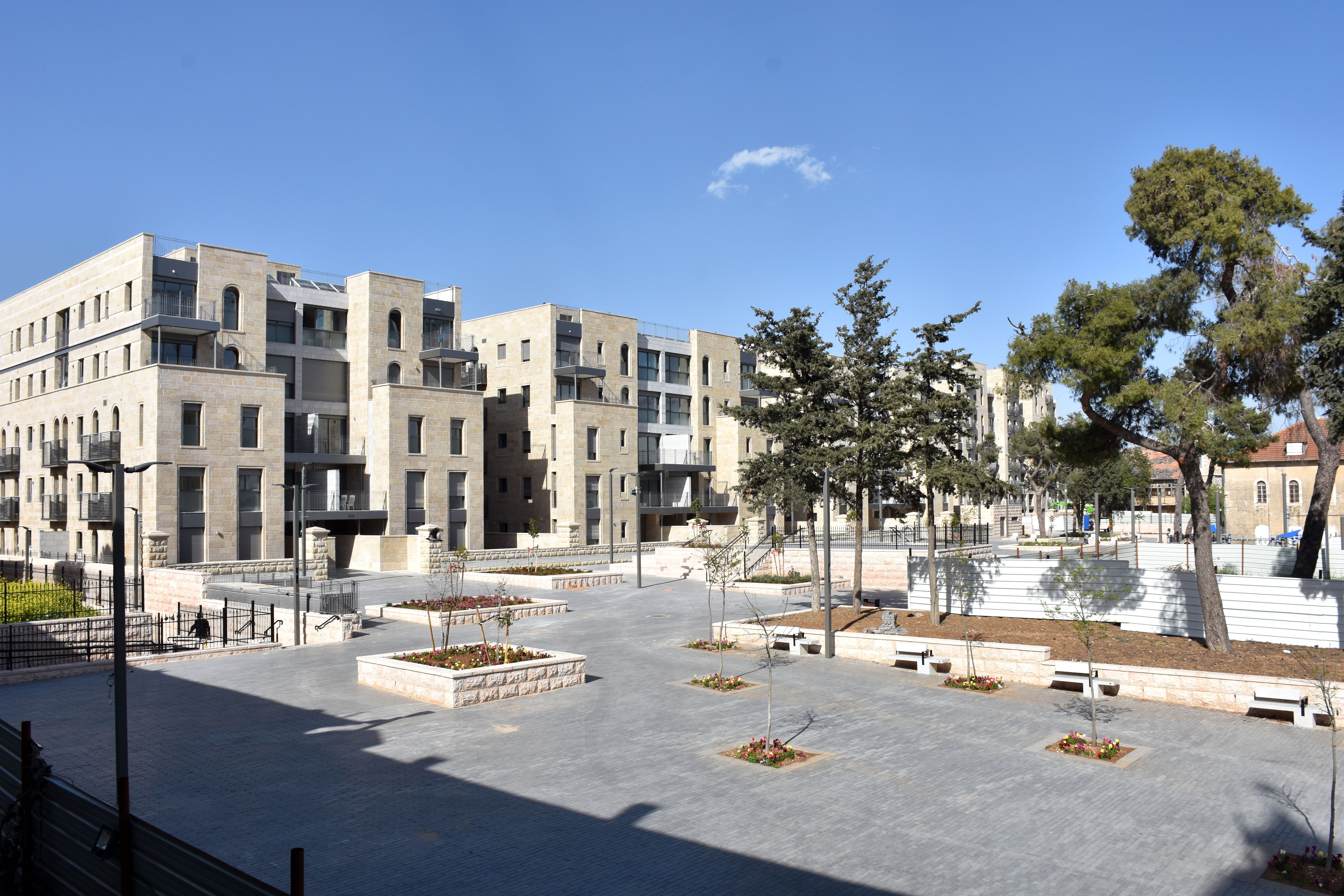 פרויקט המגורים החדש במתחם שנלר